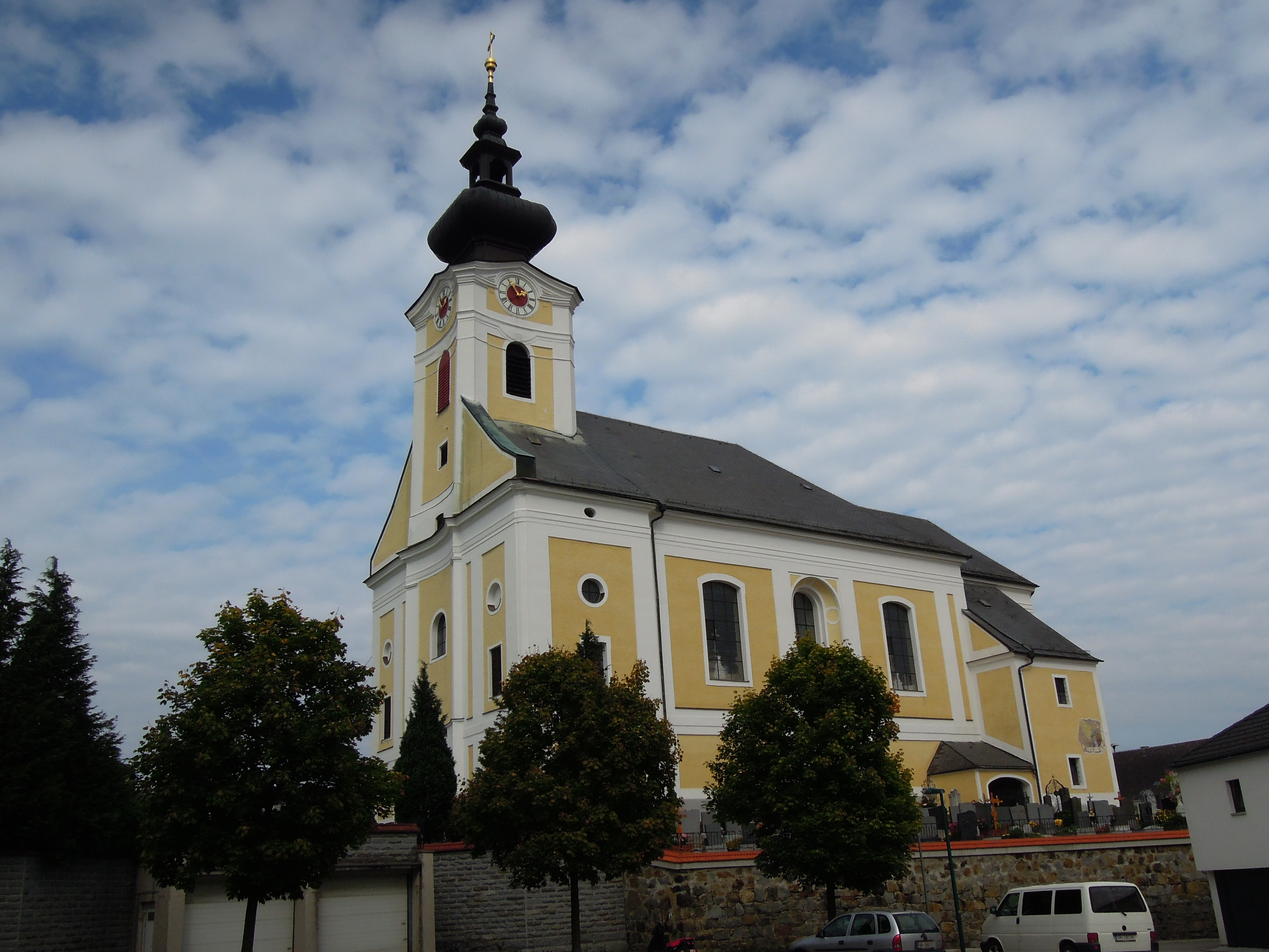 Kath. Pfarrkirche hl. Laurentius; Ansicht von Süden